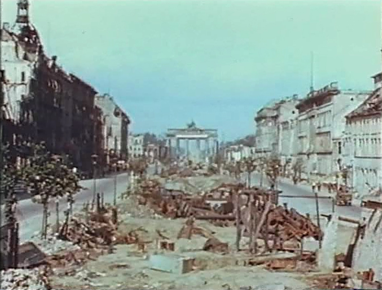 Die Berliner Straße Unter den Linden nach Kriegsende 1945